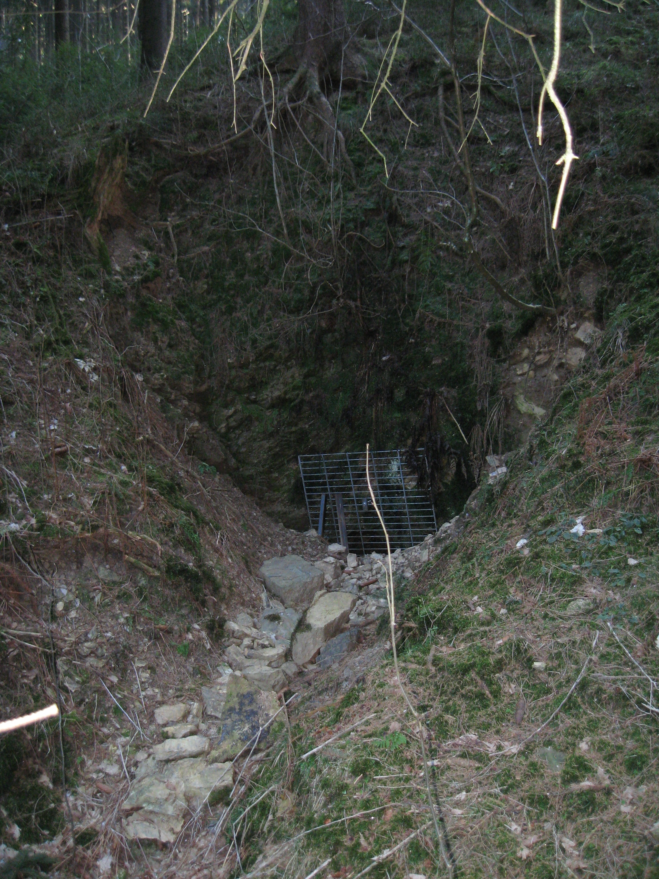 Das Stollenloch des „Mittleren Brüderbunder Stollens“ in Siegen-Eiserfeld am Hang des Pfannenbergs.